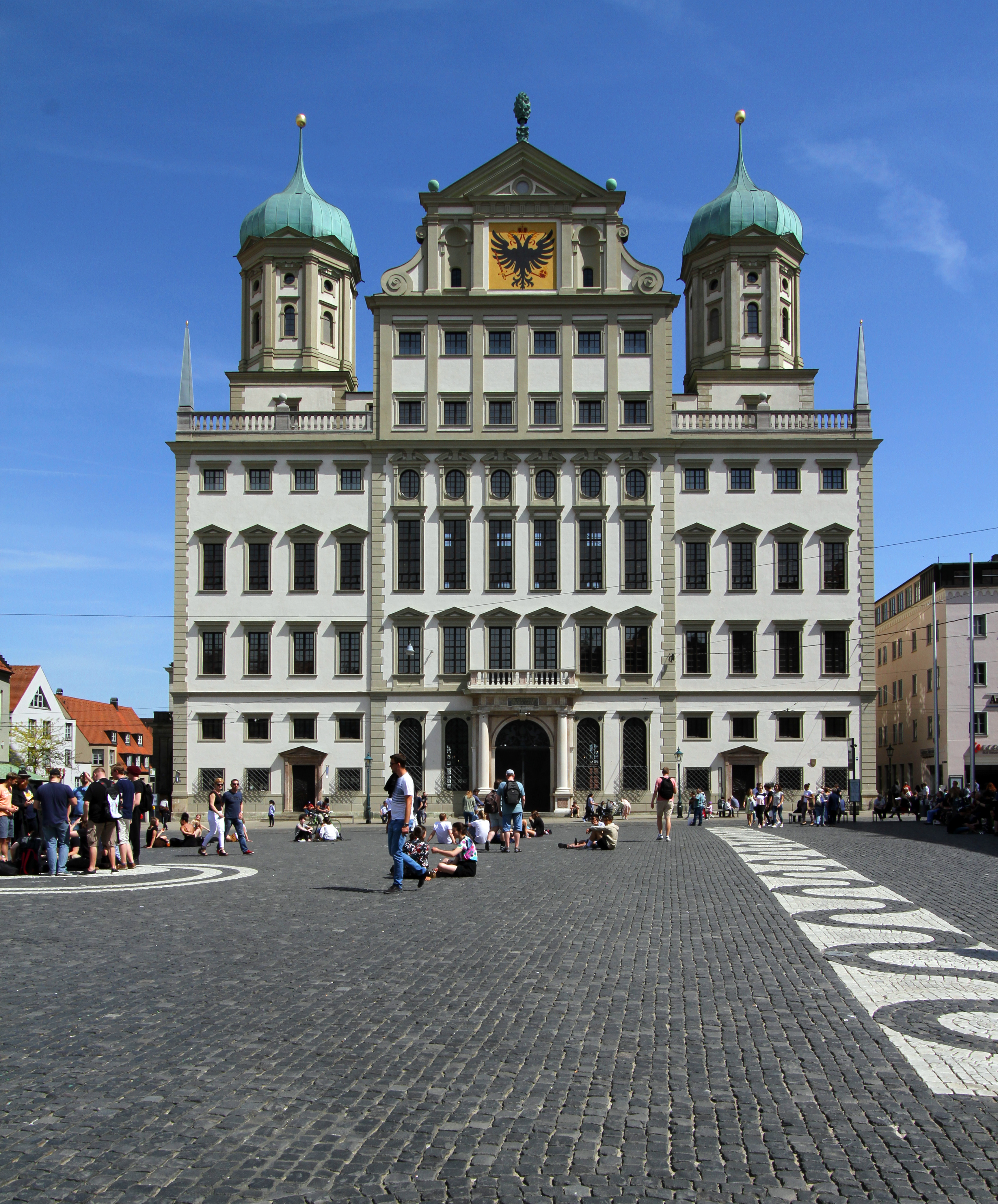 Rathaus. Geschlossener Baukörper des venezianischen Palazzotyps mit überhöhtem Mittelblock und Seitentürmen, 1615/20 von Elias Holl erbaut, 1944 schwer beschädigt, im Außenbau wiederhergestellt, rekonstruierender Ausbau des Inneren seit 1978, mit historischer Ausstattung.